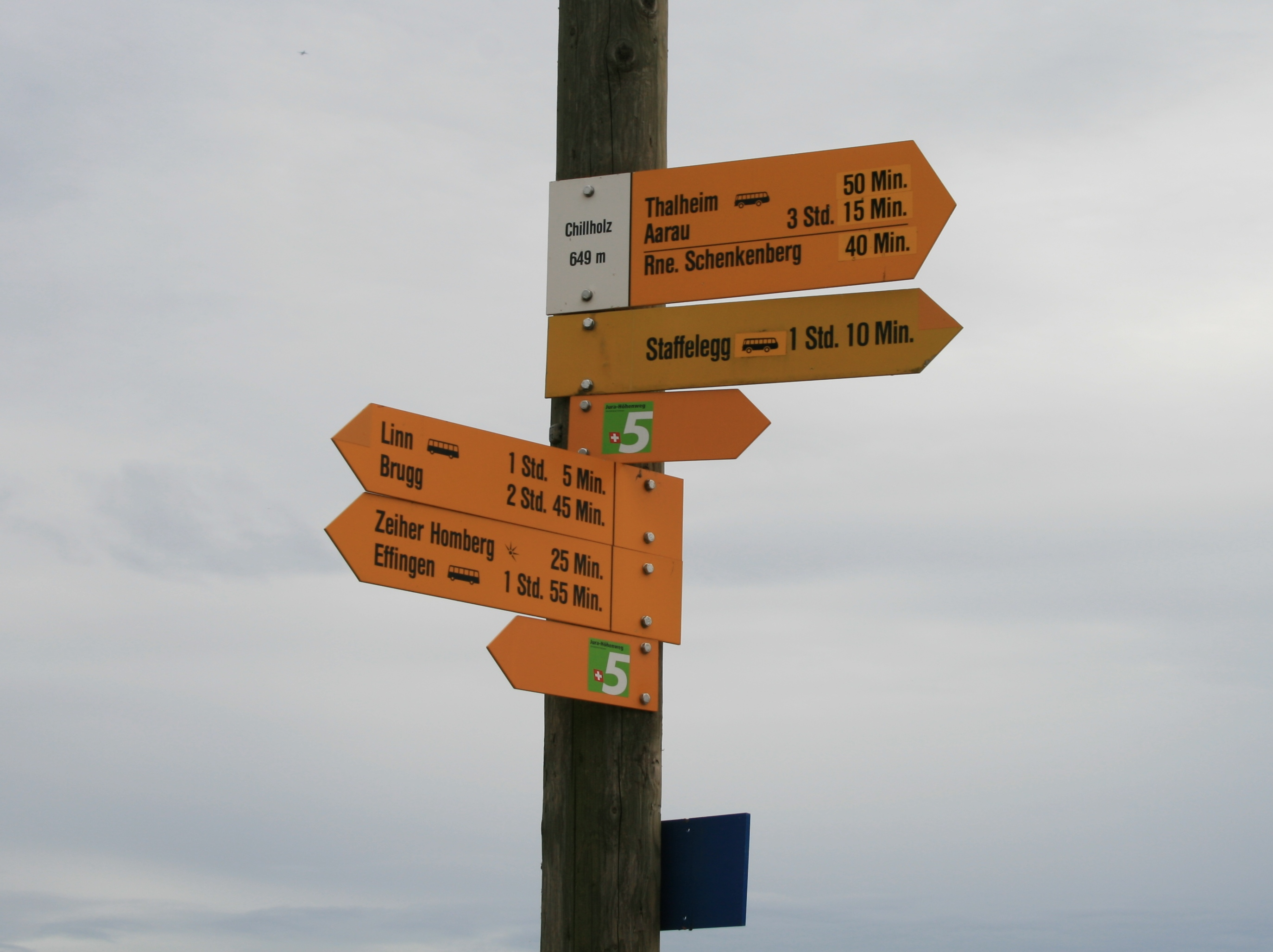 Chillholz zwüsche Thale und Zeihe